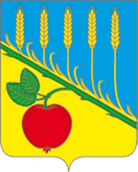 Герб Петровского района, Тамбовская область